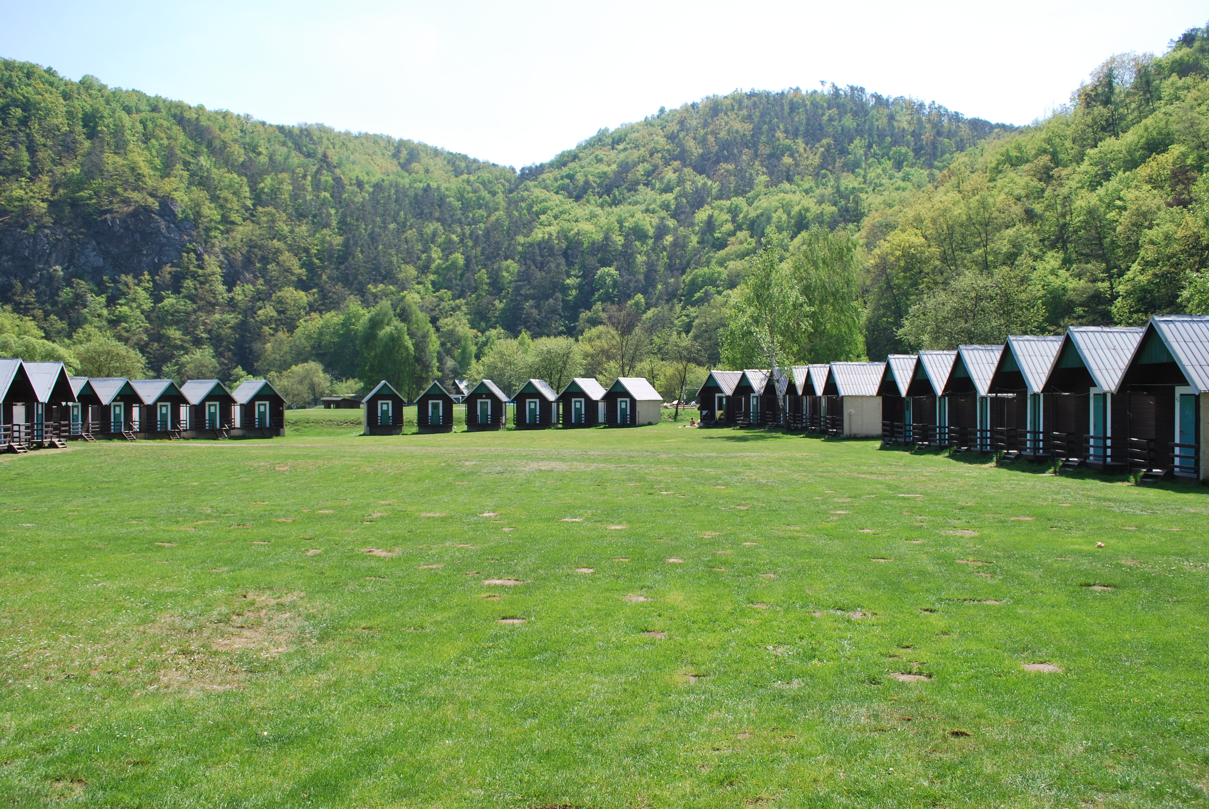 tábor pod Templštejnem-alibaba